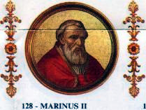 Pope Marinus II